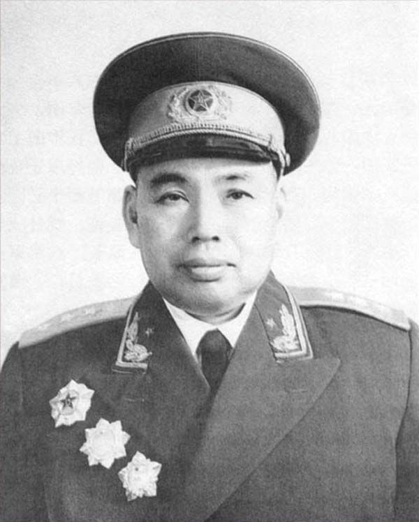 许世友上将1955年授衔照